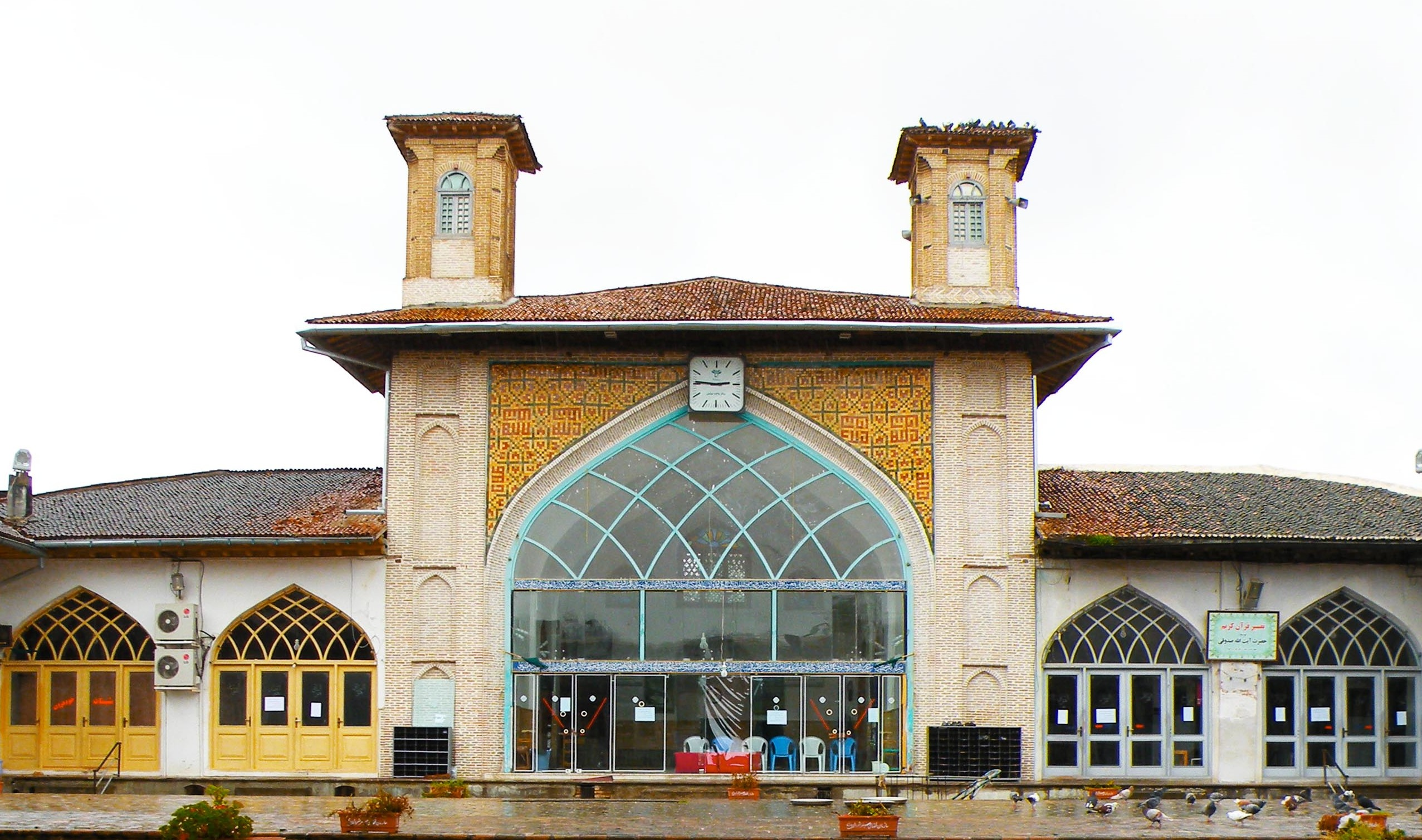 مسجد جامع ساری